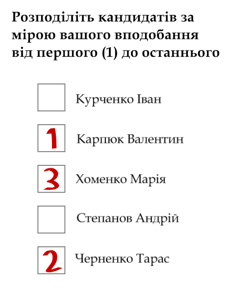 Виборча система